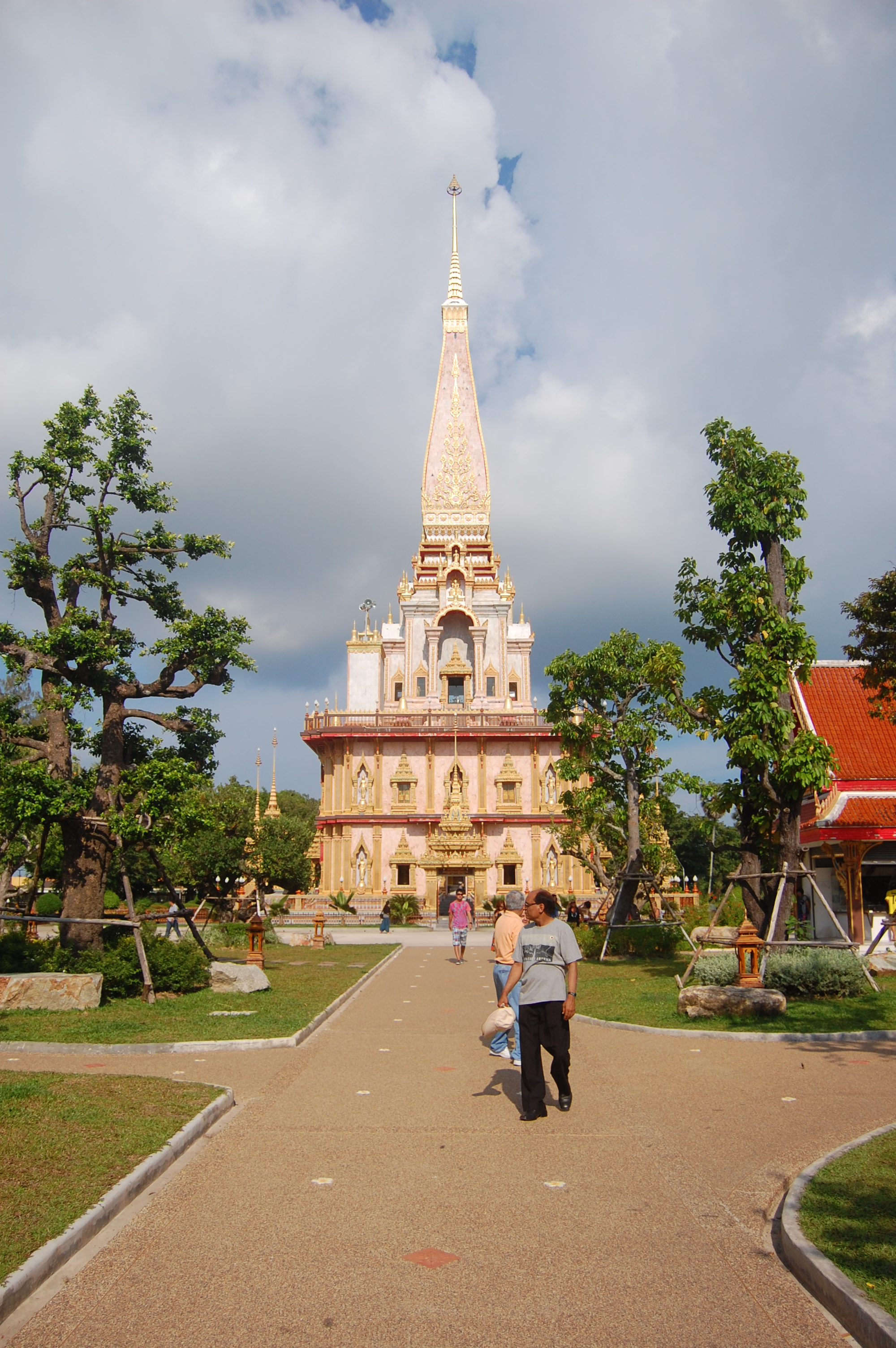 Wat Chalong in Phuket